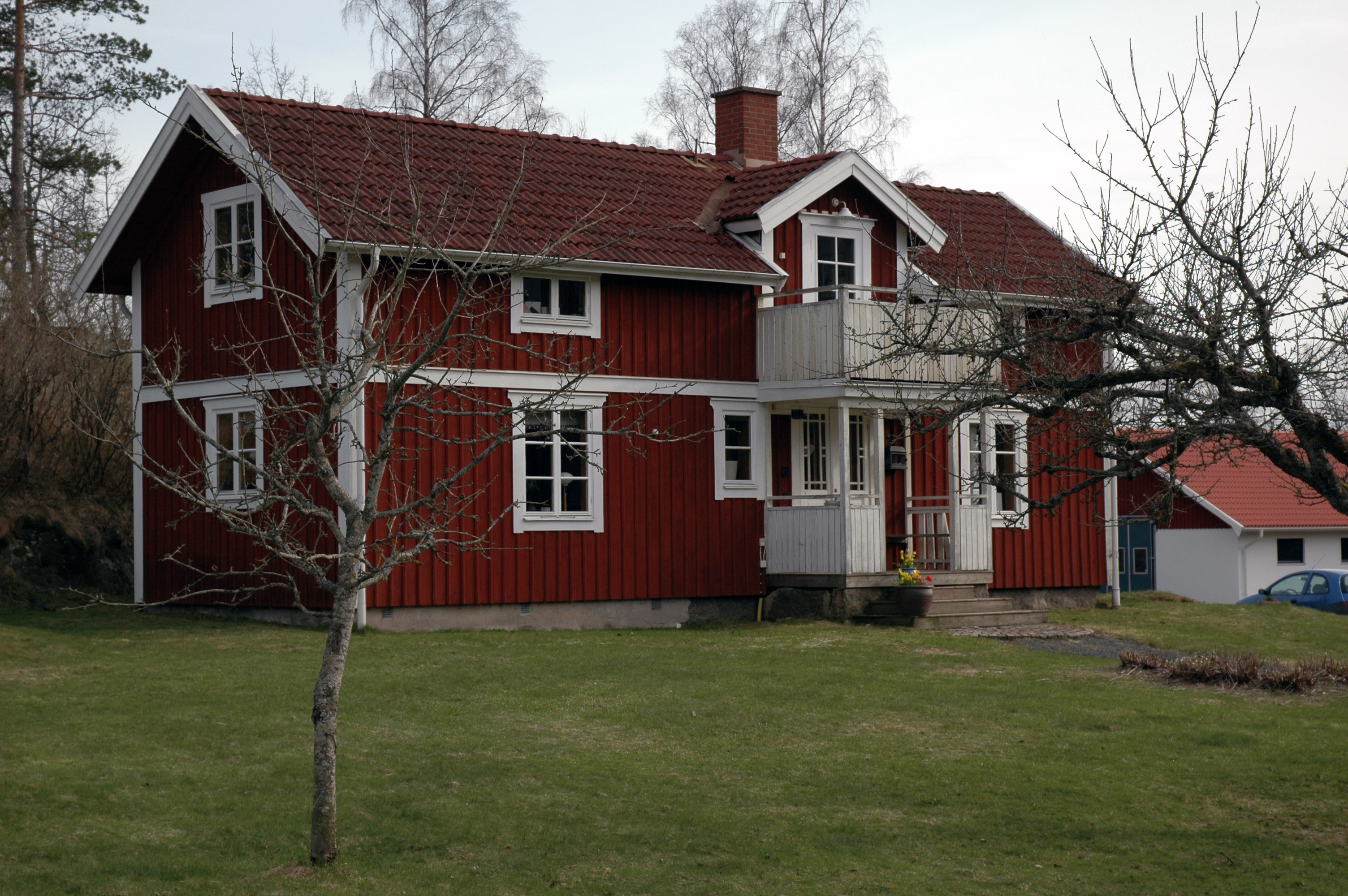 Ammarp, Hakarp, Sverige